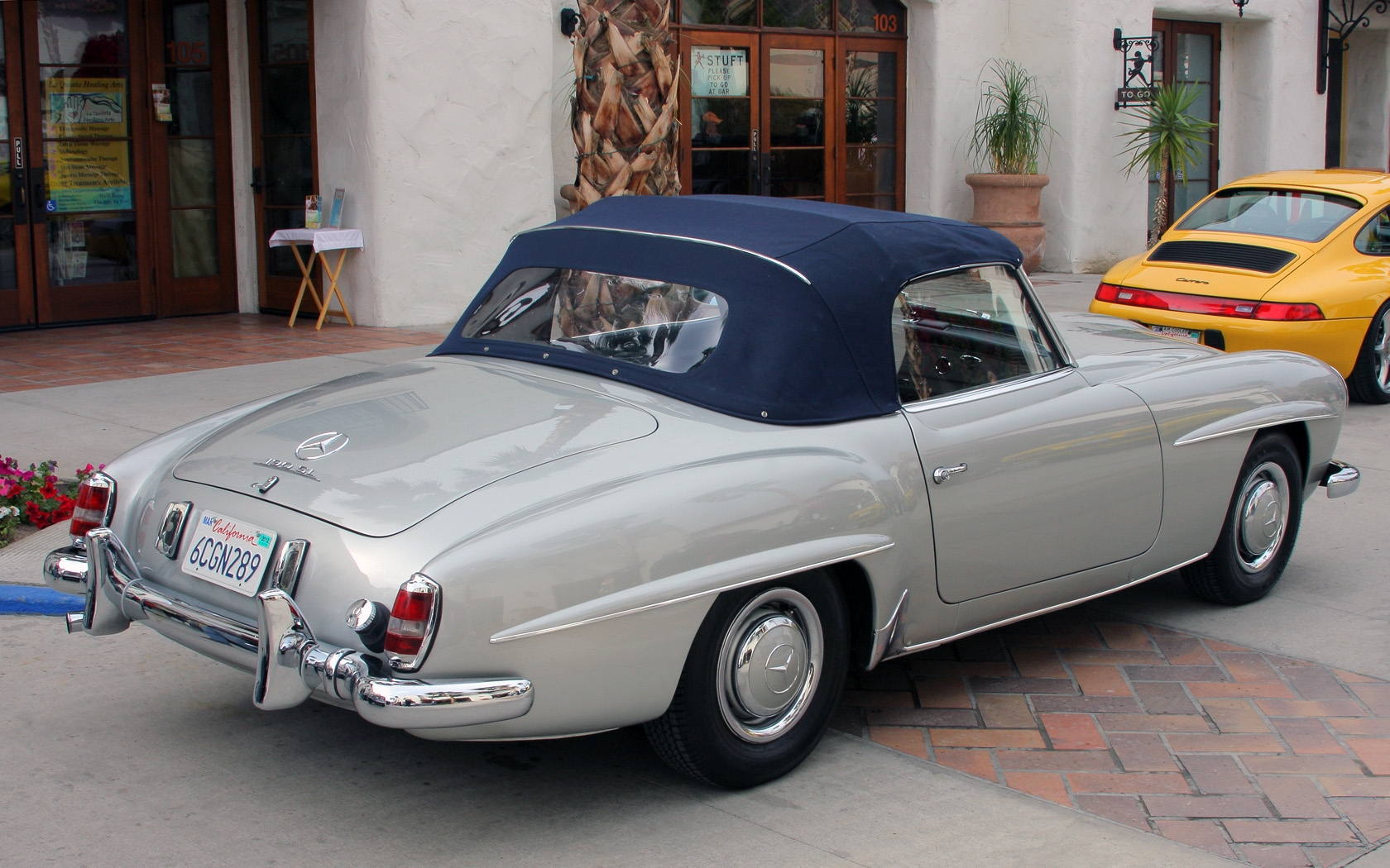 2011 Desert Classic, La Quinta, CA